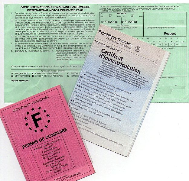 permis de conduire, carte verte et carte grise française